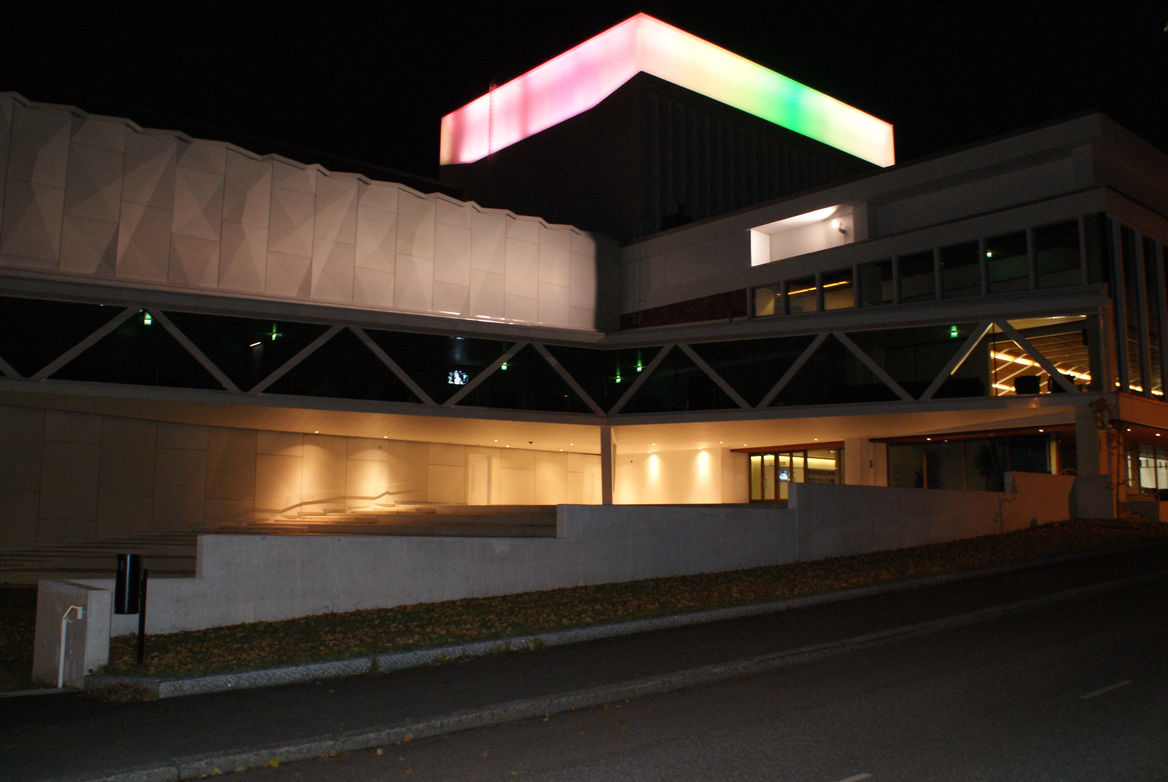 kaupungin teatteri